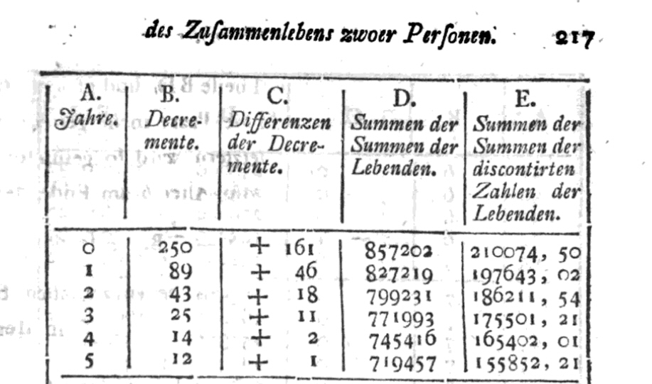 Ausschnitt aus der Sterbetafel im genannten Buch, Seite 217 (Digitalisat)